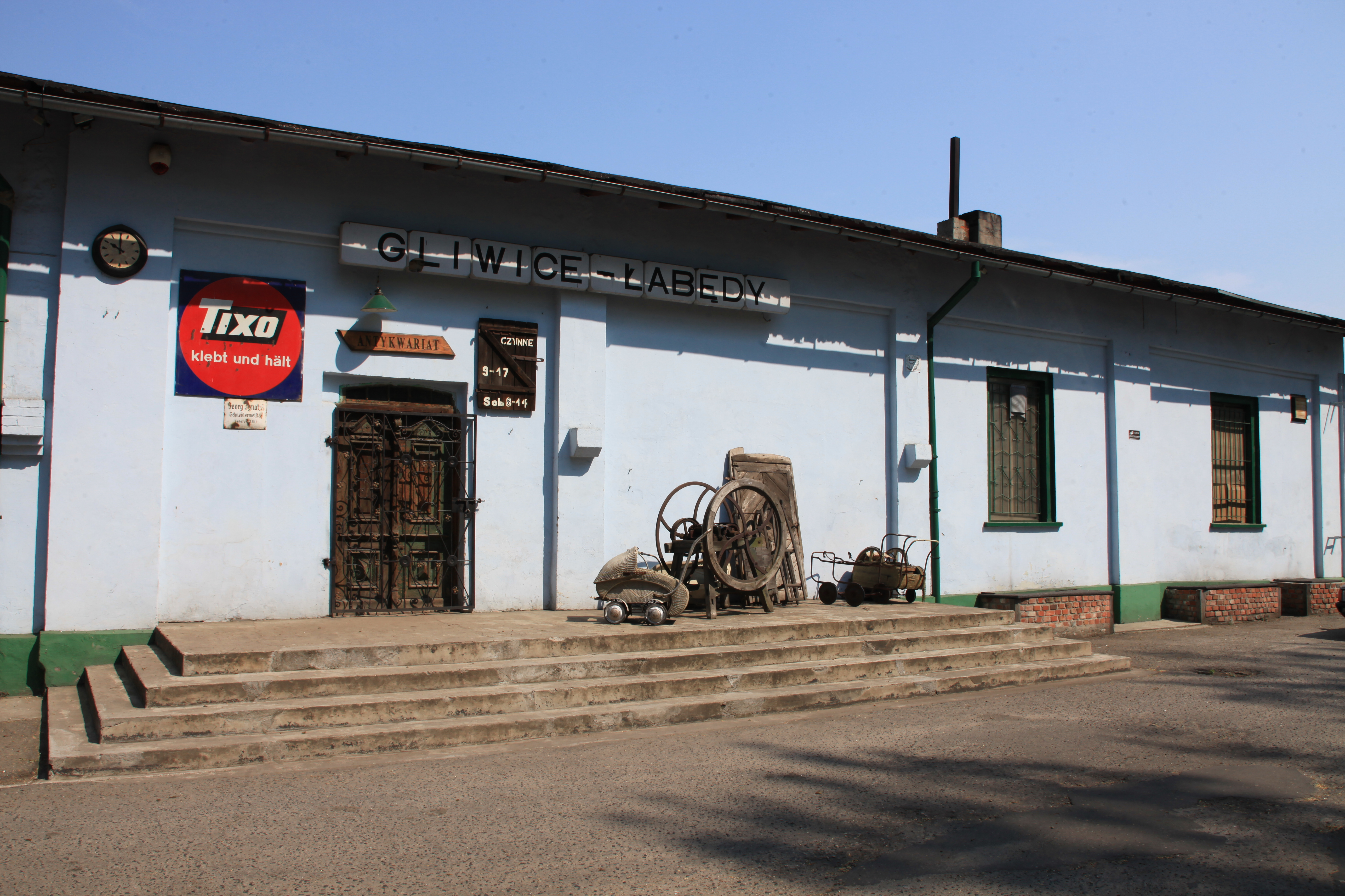 Łabędy